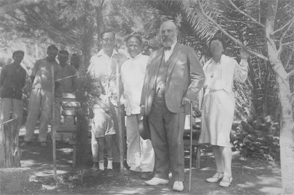 "ארזה" - מוצא-מר מנחם אוסישקין ליד ארז הרצל וברוש אוסישקין